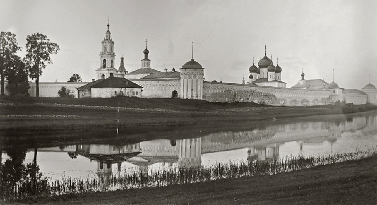 Makariev Monastery in Kalyazin